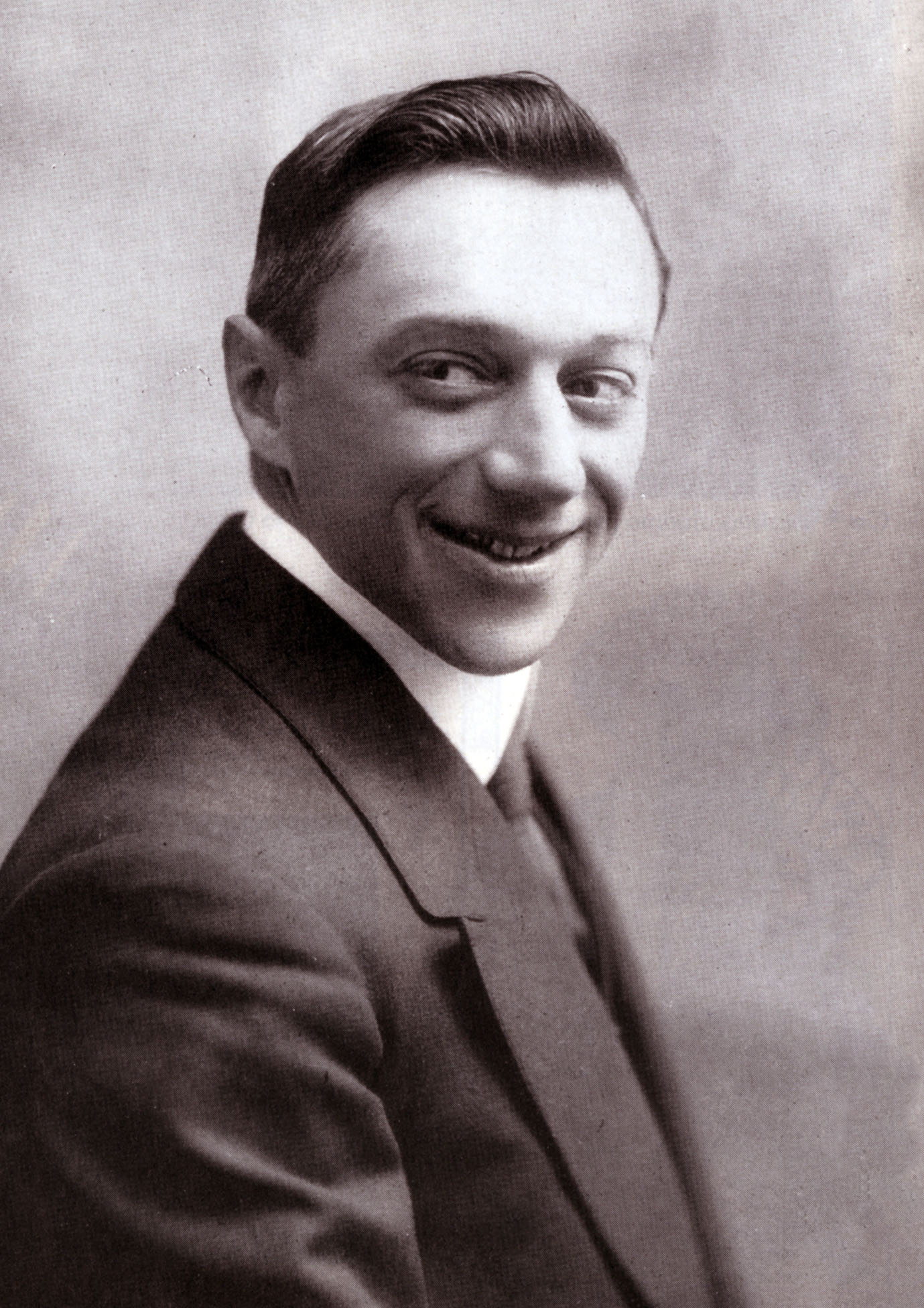 Andrè Deed